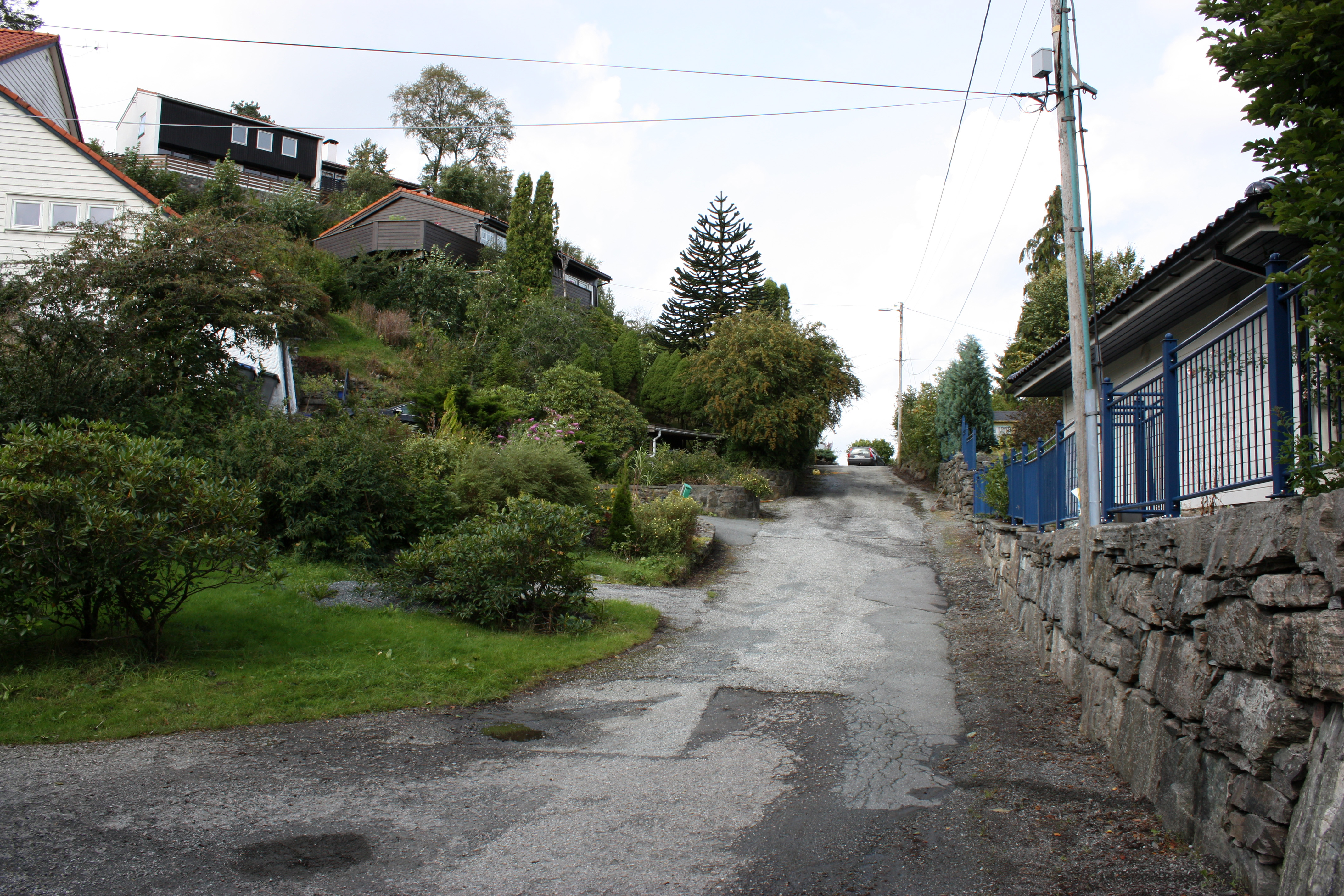 Skjolddalen, Fana, Bergen.